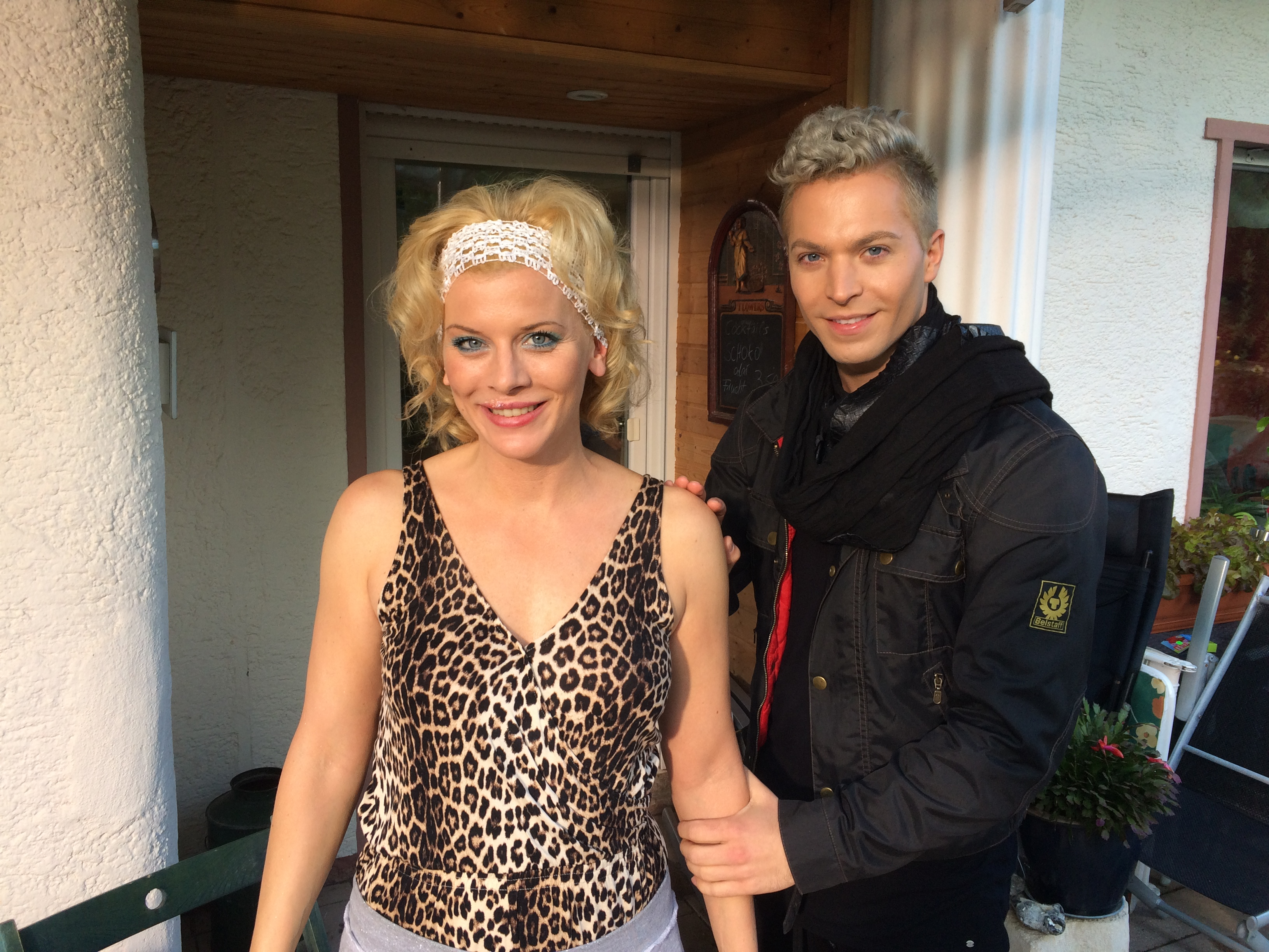 Eva Habermann und Julian David während den Dreharbeiten des Films Goblin 2